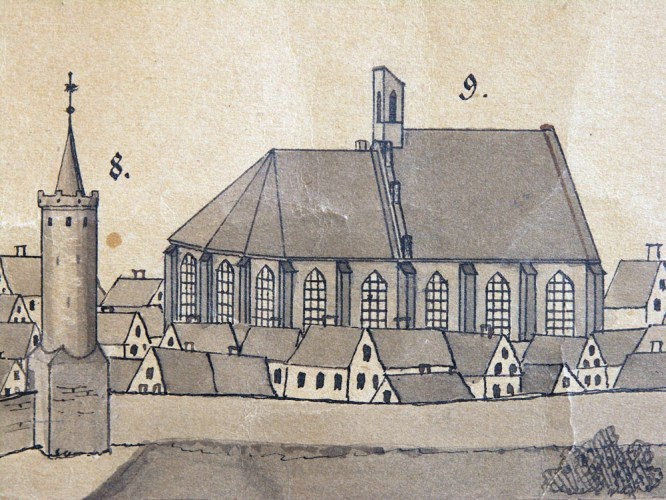 Kościół Augustiański, Widok Stargardu wg przerysu Roberta Meyera